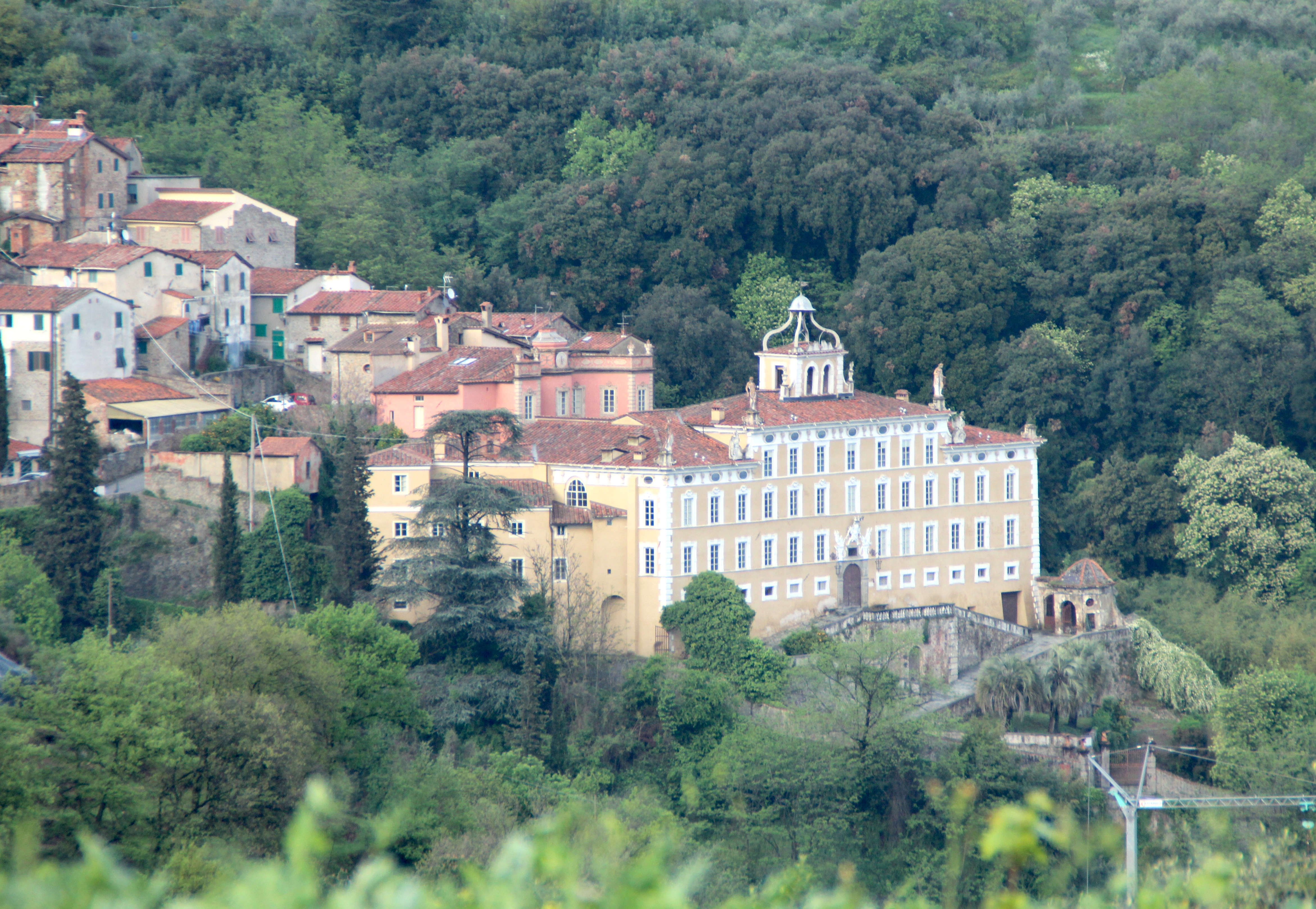 Collodi